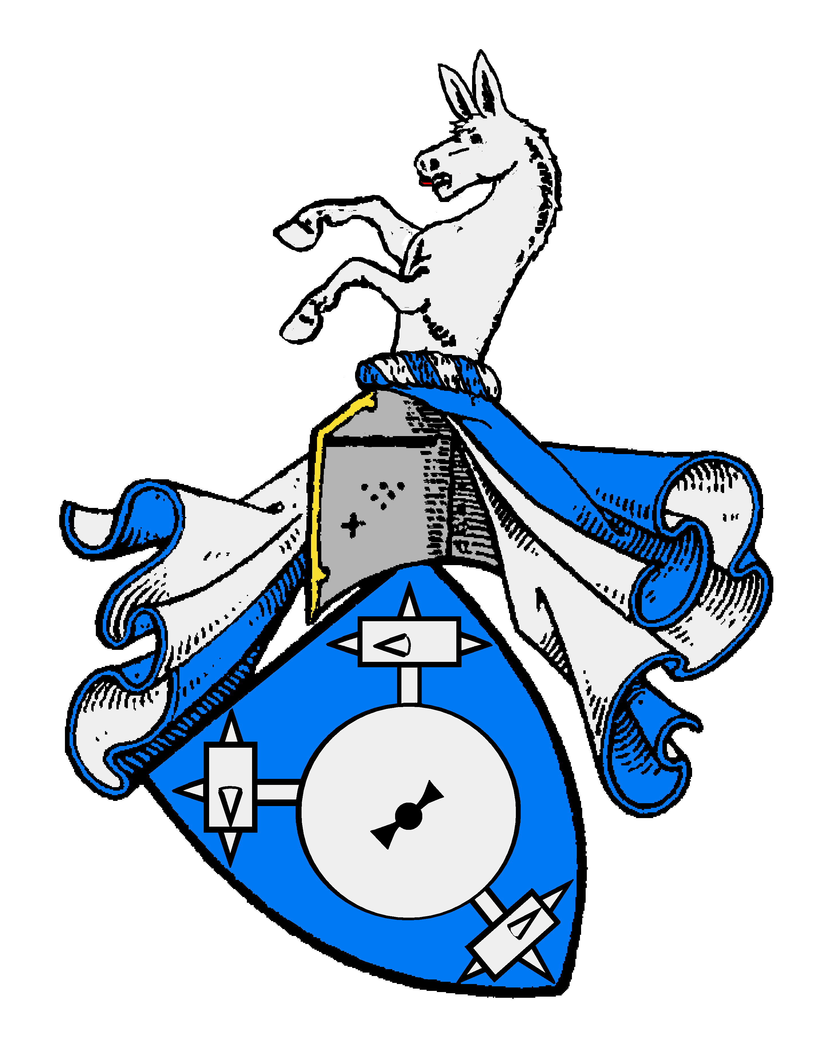 Stammwappen der altadligen schlesischen von Reichenbach